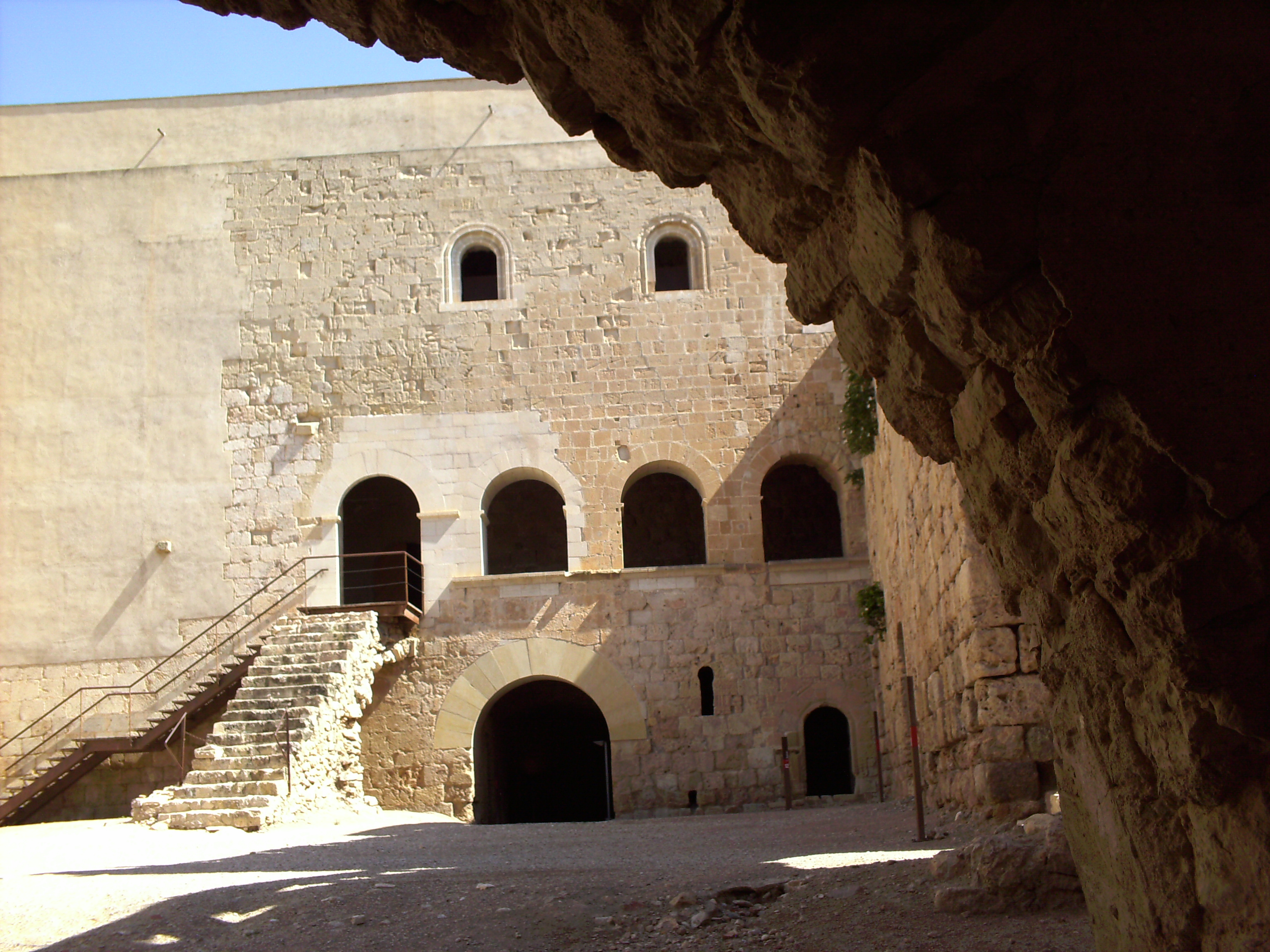 Pati del castell